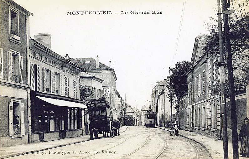 Montfermeil (France) - La Grande Rue vers 1900. Vue du Tramway Le Raincy - Montfermeil (exploité jusqu'au 14 avril 1938)